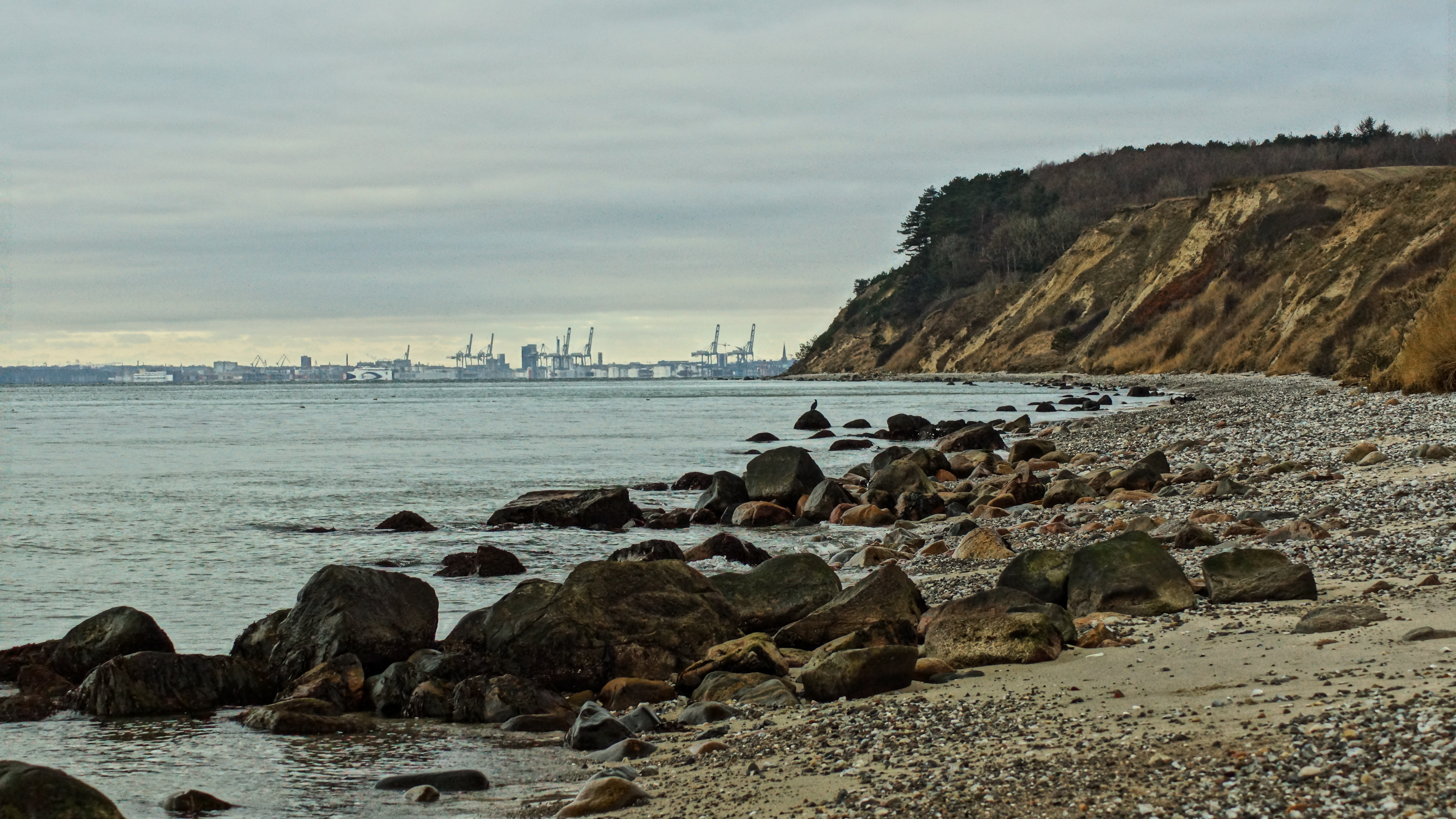 Mols Hoved, Århus i det fjerne.